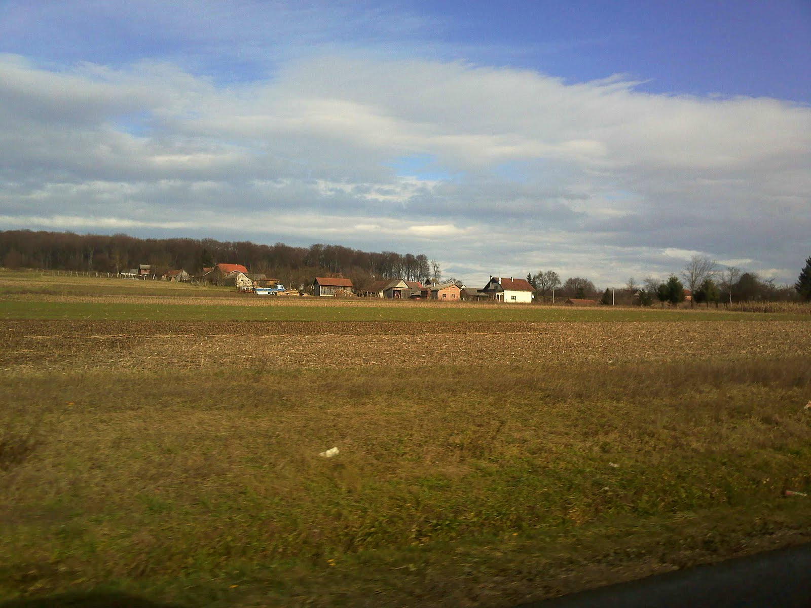 Sunčano jutro